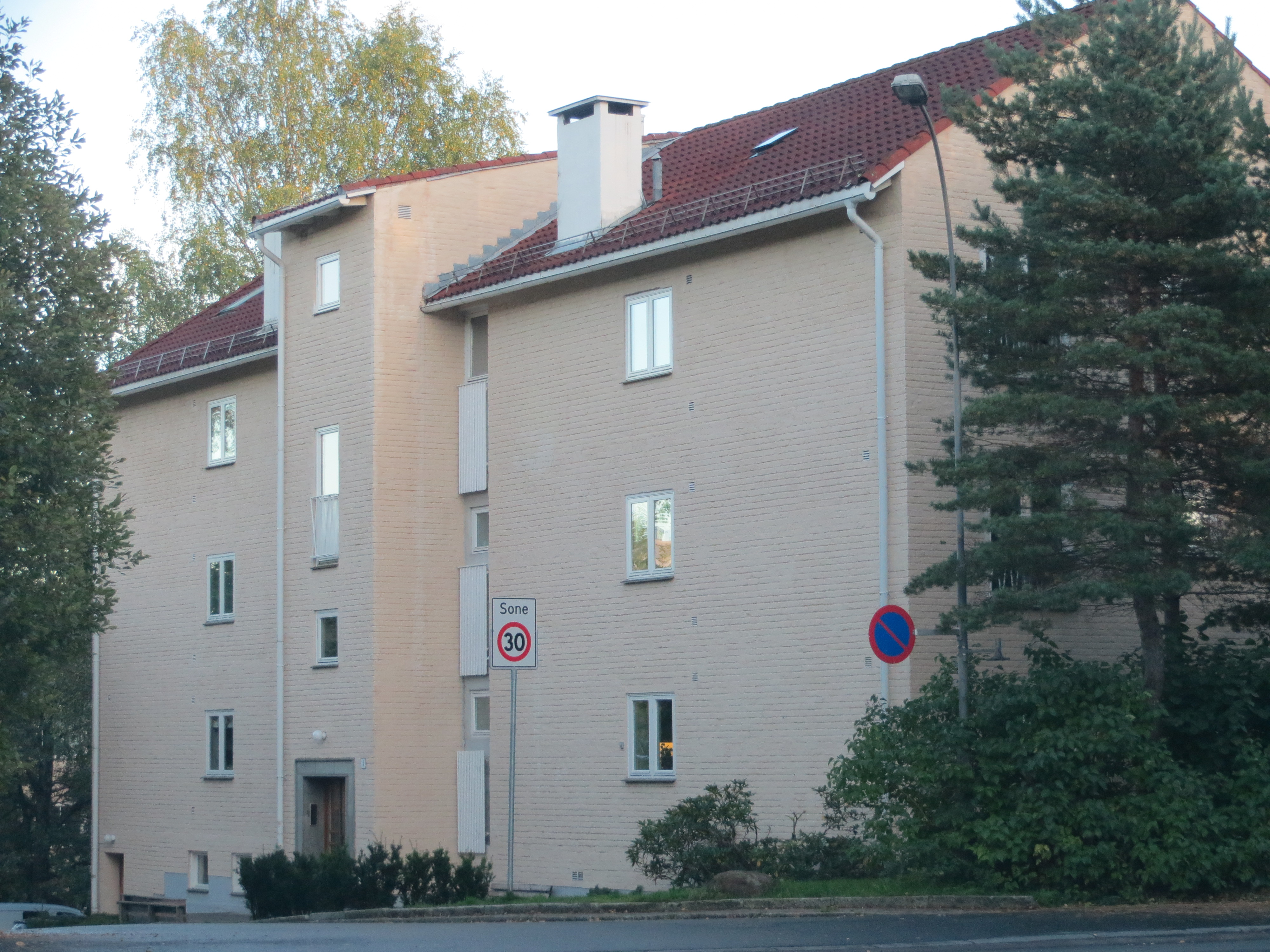 Flyveien, Luftfartsveien og Landingsveien har et sammenhengende, funksjonalistisk blokkmiljø omkring "Snippen", med kommunalt listeført bygningsvern. Hovseter i bydel Vestre Aker, Oslo.